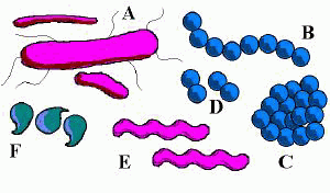 Afbeelding gekopieerd vanaf Wikipedia-en. by Nagina Parmar (Image created by the author and donated to Nupedia.) - Nupedia is a GFDL work, so this image is presumably also under the GFDL. {| border="1" ! date/time || username || edit summary |---- | 18 jun 2005 23:46 || :nl:Gebruiker:Rex || ( GFDL ) |---- | 13 apr 2004 20:47 || :nl:Gebruiker:RobotE || (Afbeelding gekopieerd vanaf Wikipedia-en. De beschrijving daar was: from Nupedia article on bacteria - by Nagina Parmar (Image created by the author and donated to Nupedia.) - Nupedia is a GFDL )